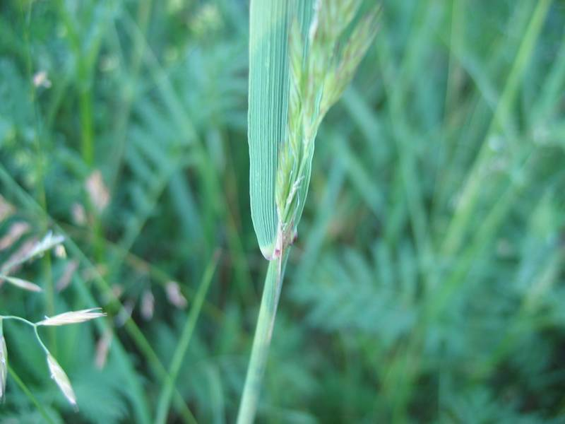 Blatt vom Sand-Reitgras Calamagrostis epigejos